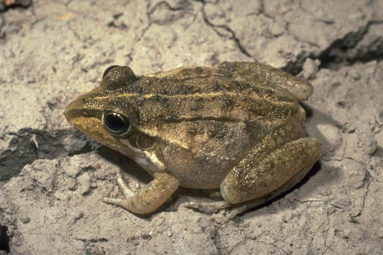 Cyclorana alboguttata